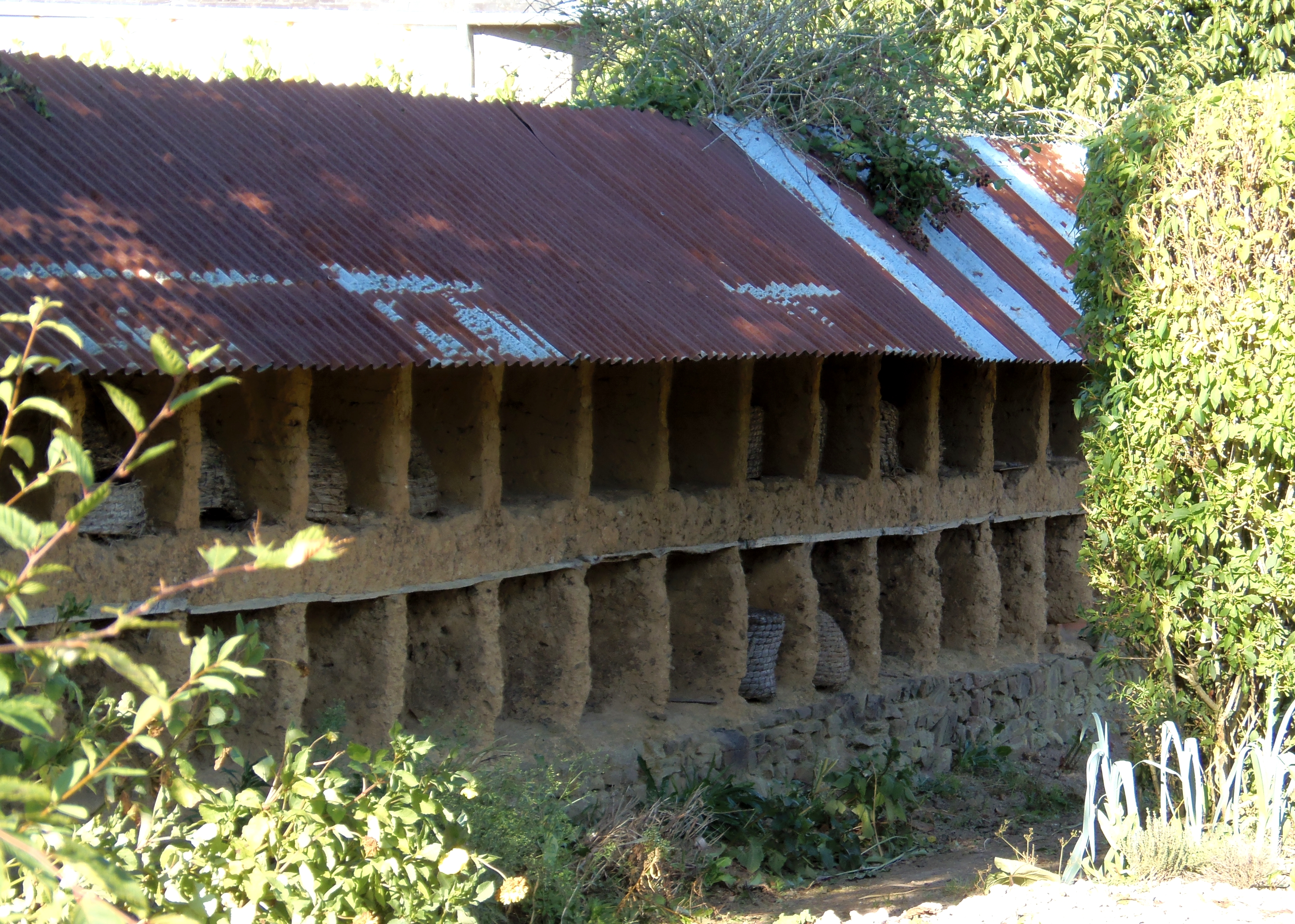 Tessy-sur-Vire (Normandie, France). Le mur à abeilles.